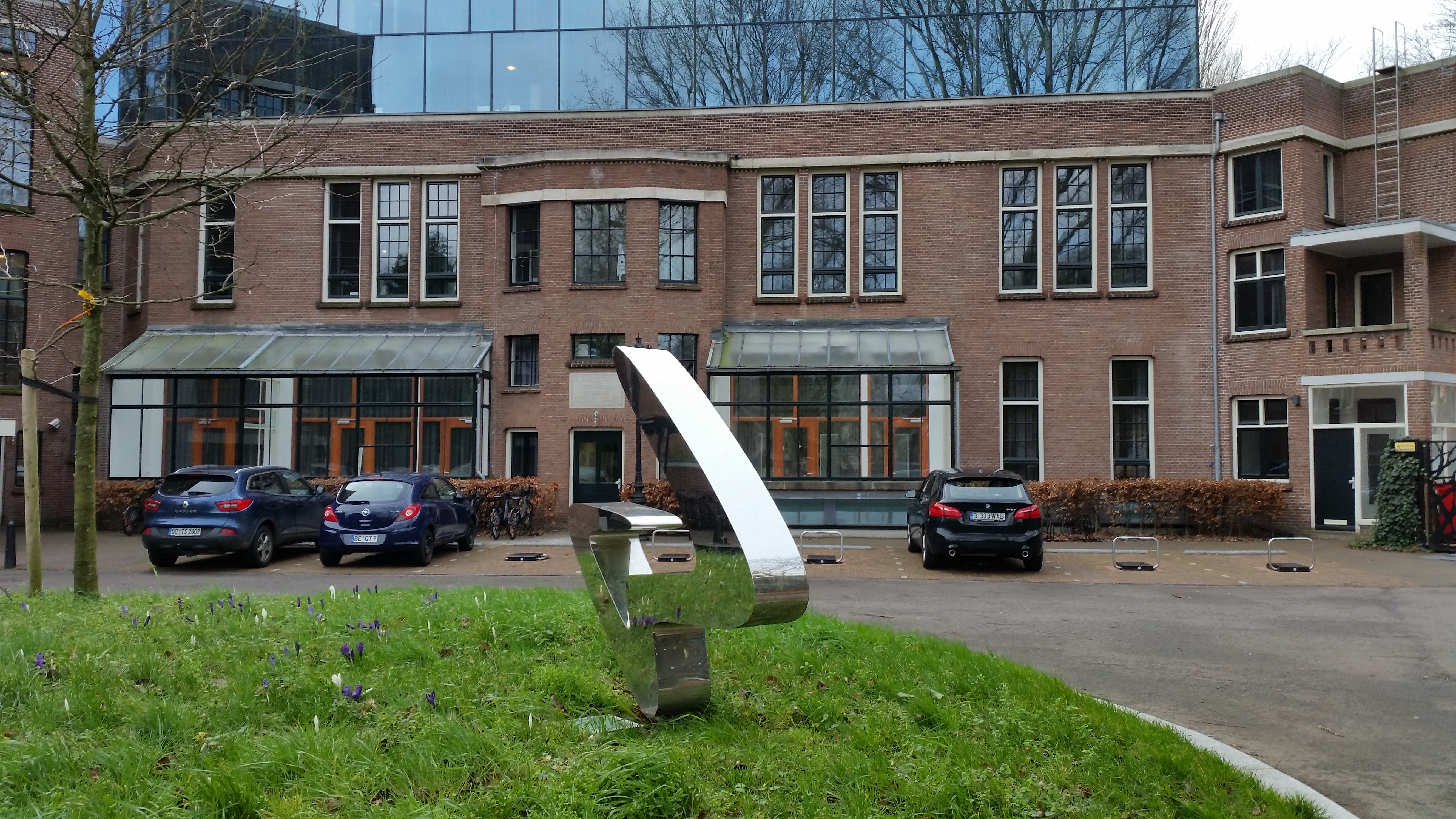 Impressie van Mauritskade 57, Amsterdam (februari 2020)